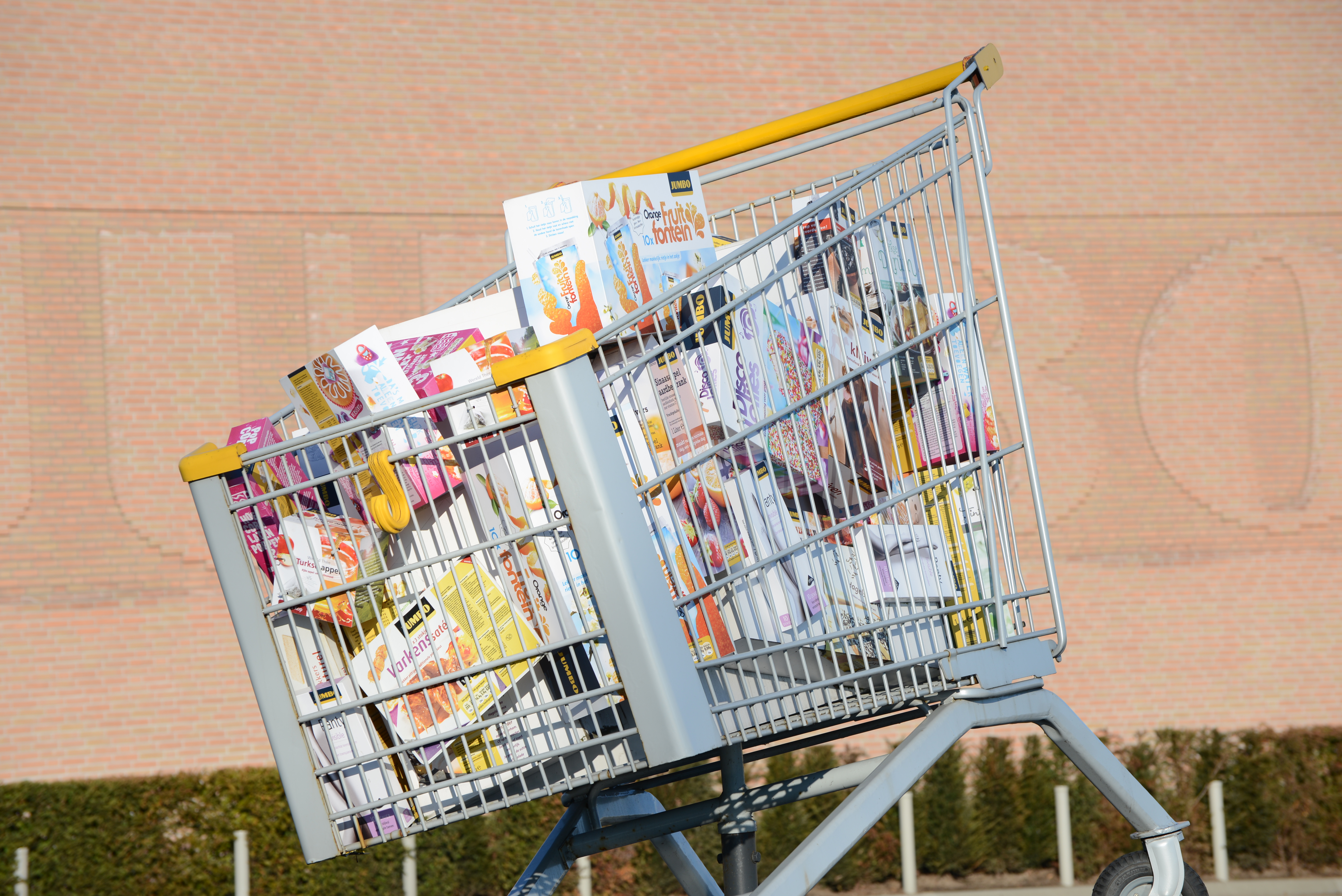 Winkelwagentje bij de ingang van het Jumbo Hoofdkantoor in Veghel. Jumbo Supermarkten HoofdkantoorRijksweg 155462 CE Veghel